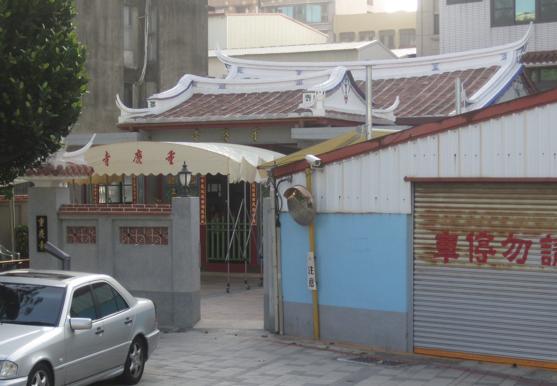 2014年所拍攝之整修後的重慶寺外觀